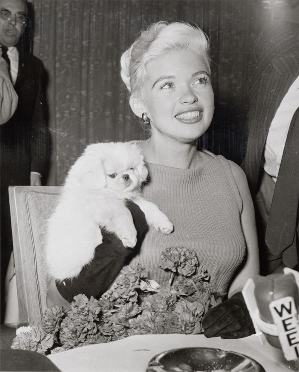 Bezoek Jayne Mansfield met pekineesje Powderpuff tijdens persconferentie op Schiphol, 10 oktober 1957 Foto Ben van Meerendonk / AHF, collectie IISG, Amsterdam